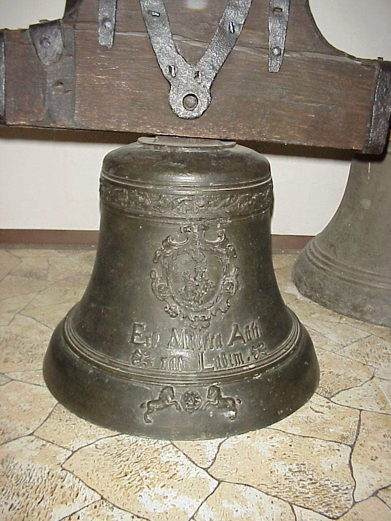 bell in Ústí nad Labem